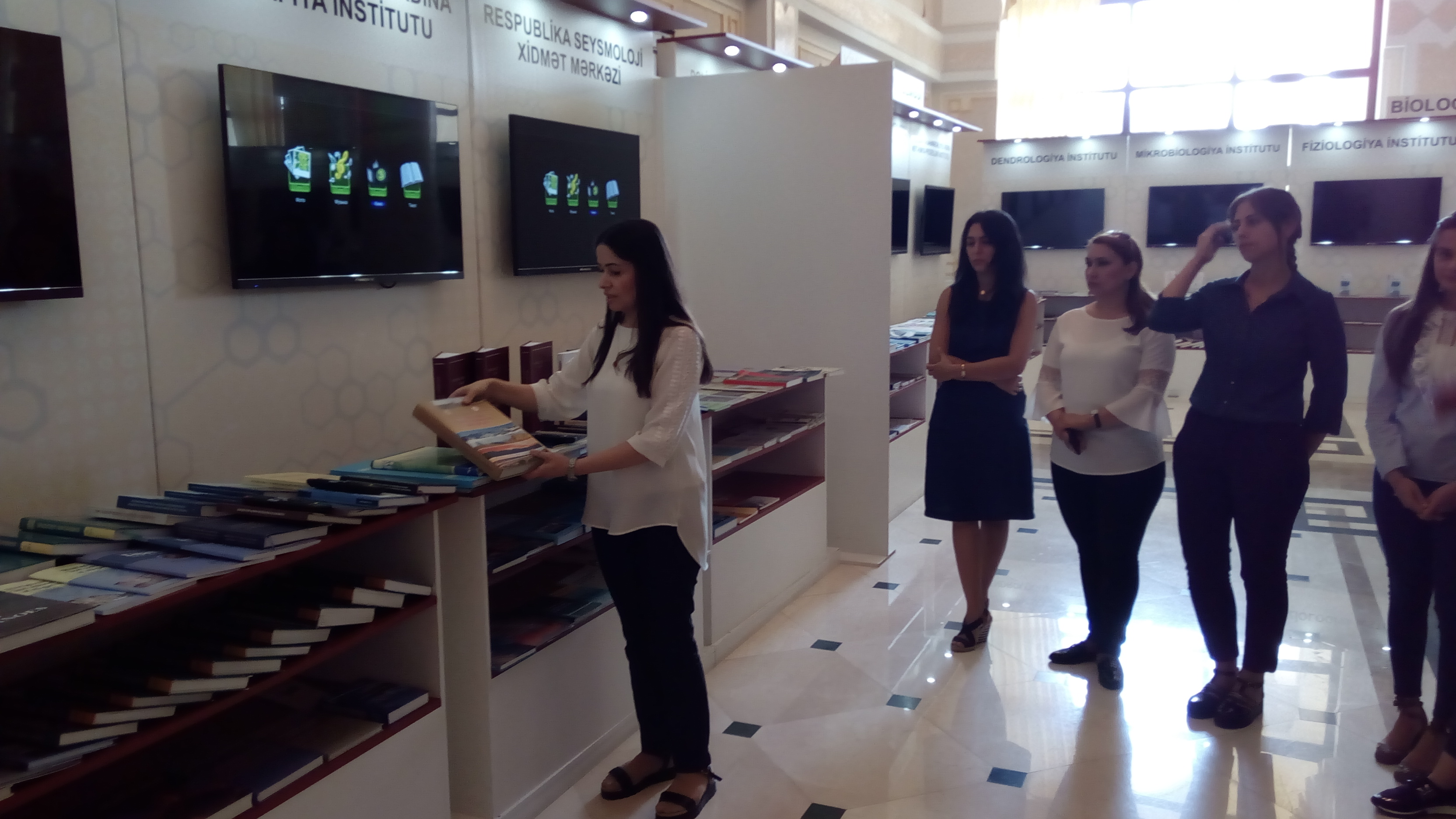 AMEA Coğrafiya İnstitutunun vikipediyaçıları